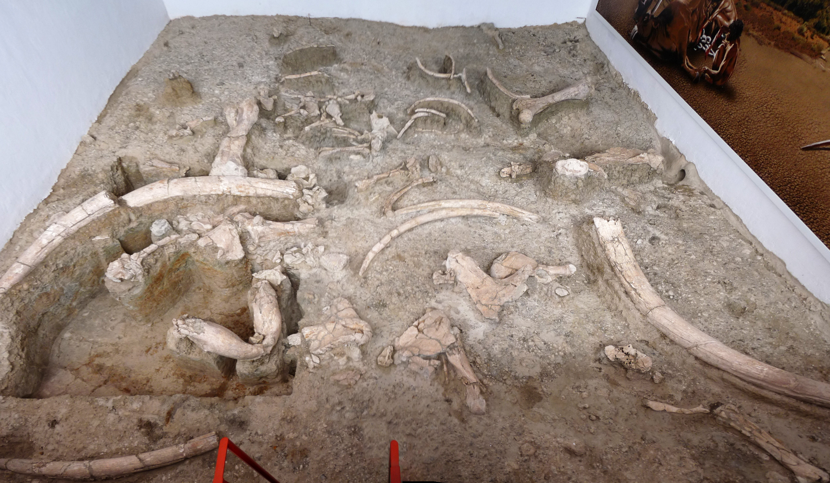 Ambrona - Yacimiento arqueológico / paleontológico - De hace 300.000 años. [1]